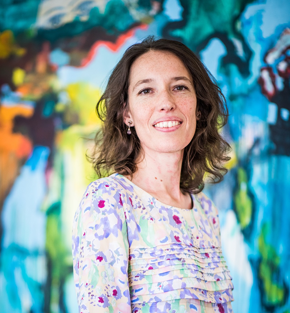 Carolina Valdivia Torres, Subsecretaria de Relaciones Exteriores en 2016